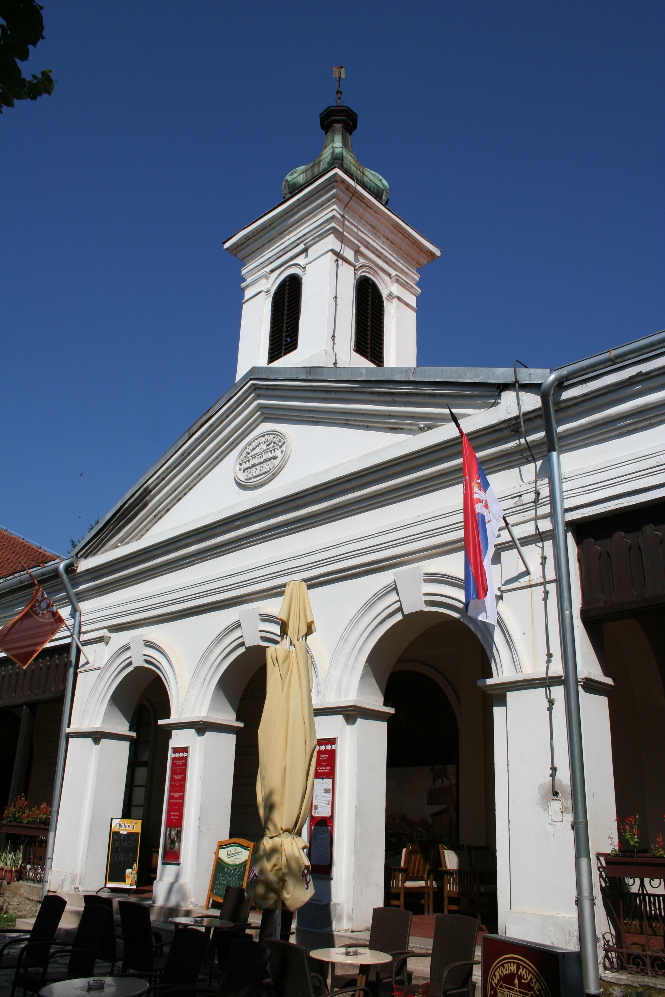 Zgrada muzeja Valjevo